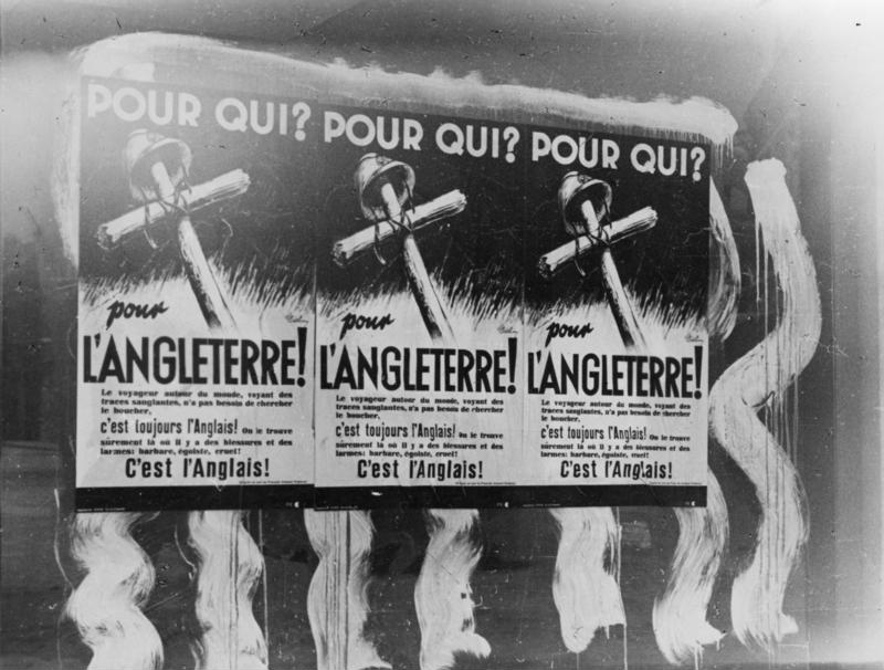 Frankreich, Anti-englische Plakate Plakate werden von deutschen Soldaten in einem franz. Ort angebracht, auf denen auf die Kriegsschuld Englands hingewiesen wird, wo die eigentlichen Kriegshetzer zu suchen sind. PK - Bieling - Scherl Bilderdienst Juni 1940